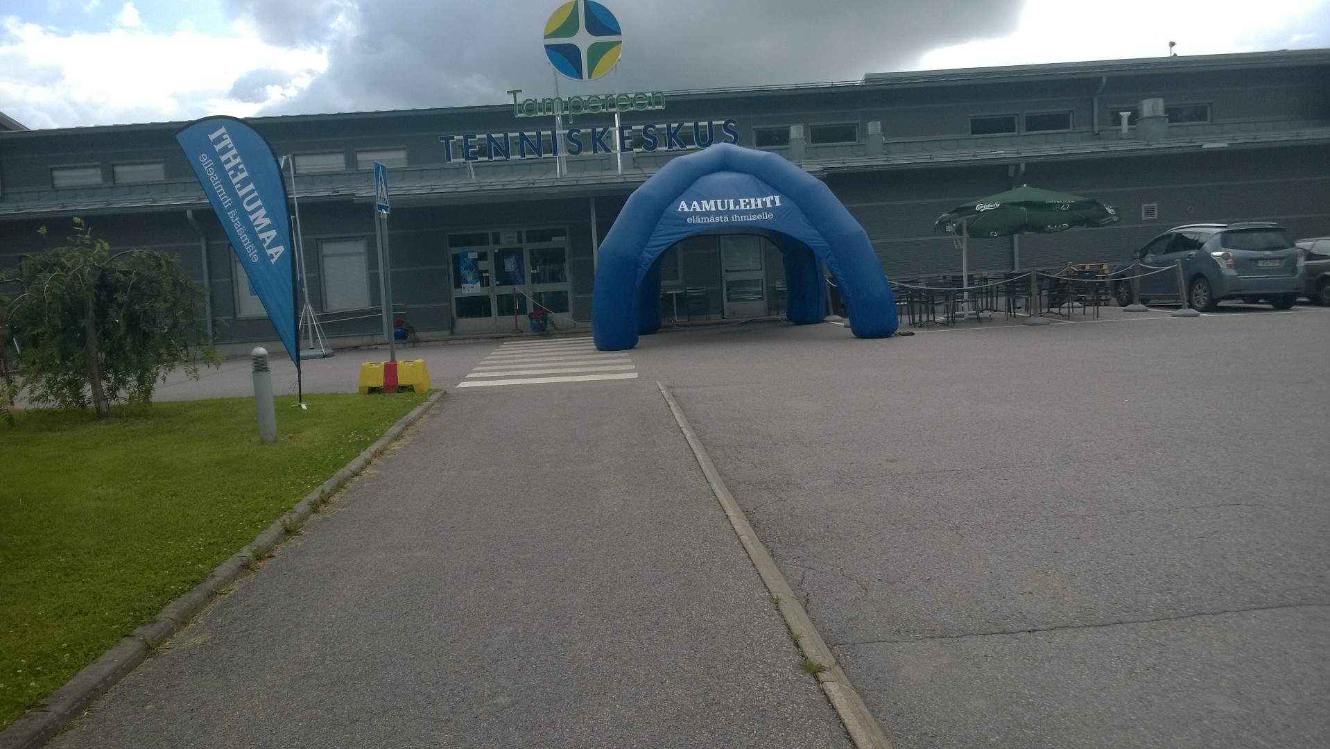 Tampereen Tenniskeskus Ruotulassa, Tampereella.